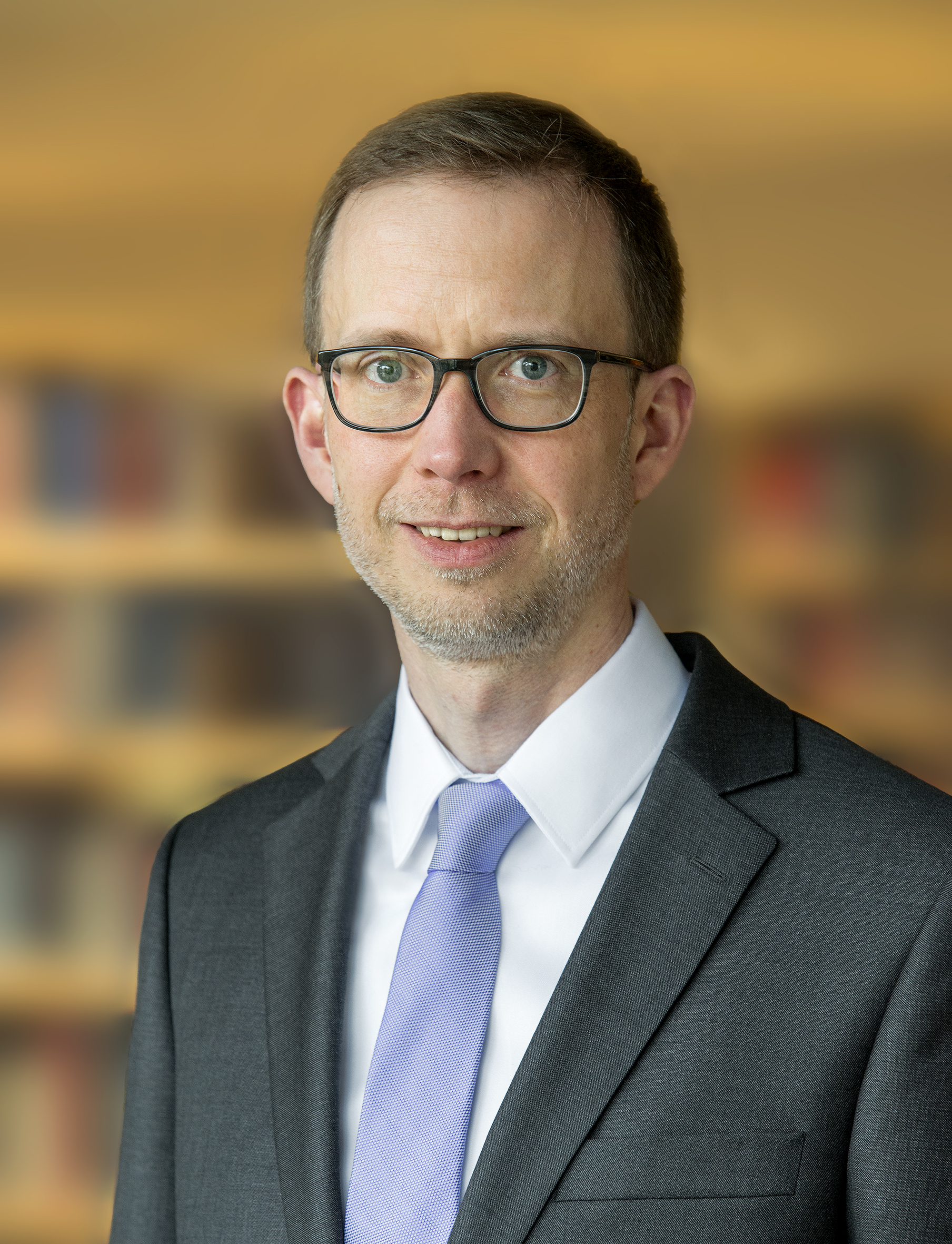 Dr. Thorsten Smidt, Ausstellungsdirektor der Stiftung Haus der Geschichte der Bundesrepublik Deutschland